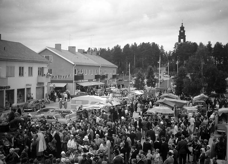 Marknad i Åsele.; Miljöer; Torgmiljö